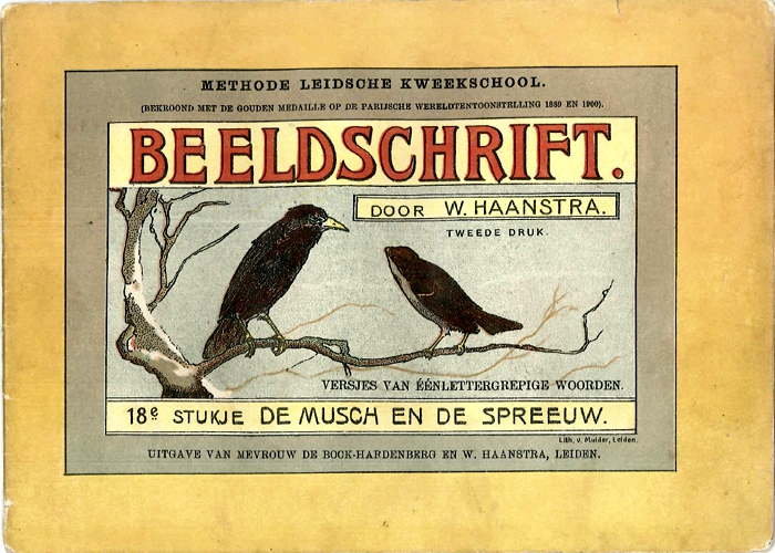 Boekje Beelschrift van Wijbrandus Haanstra uit de collectie van de Methode Leidsche Kweekschool.